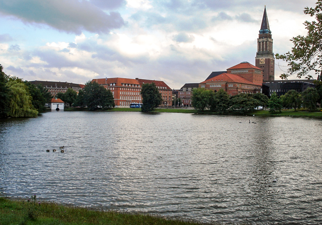 Der Kleine Kiel - West